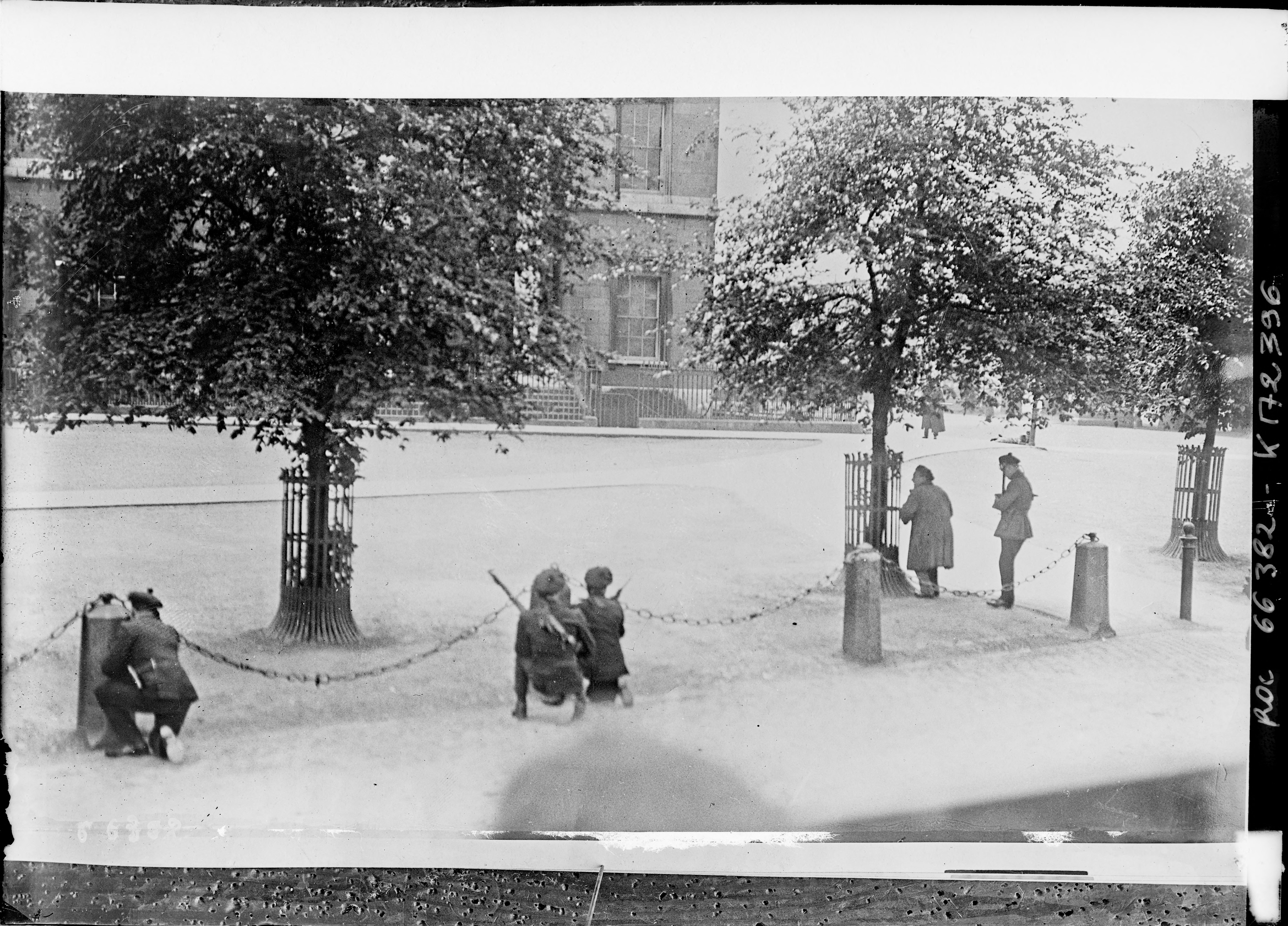 pendant la fusillade devant la maison des douanes, Dublin, 25 mai 1921